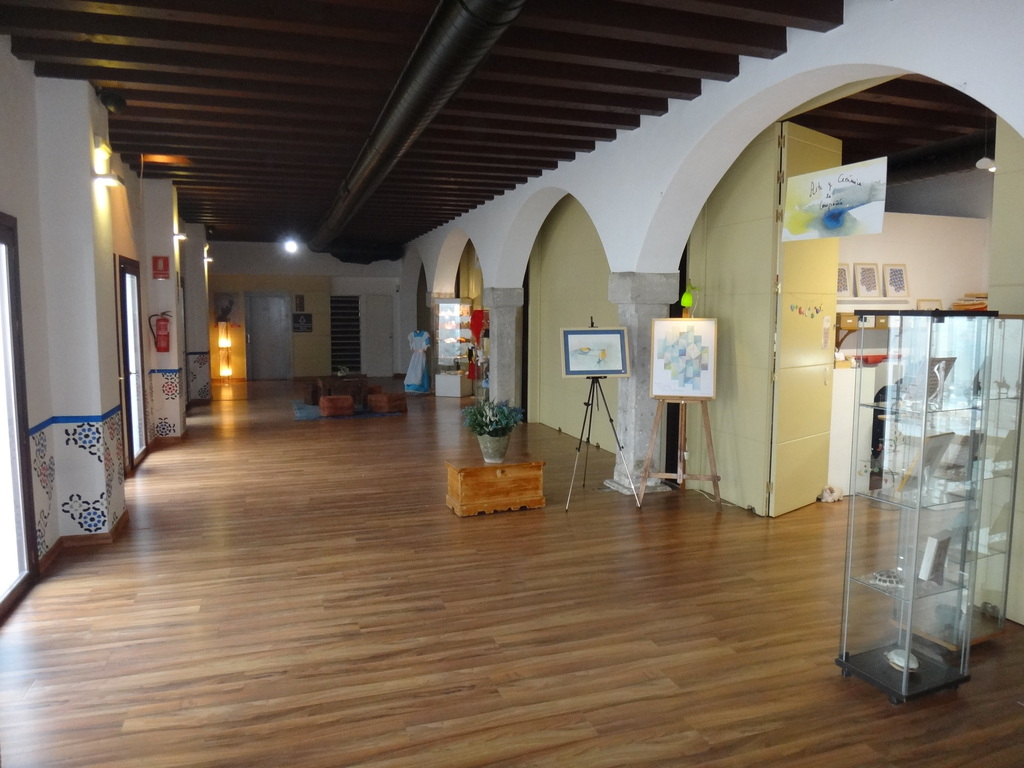 en Jerez de la Frontera (Andalucía, España)